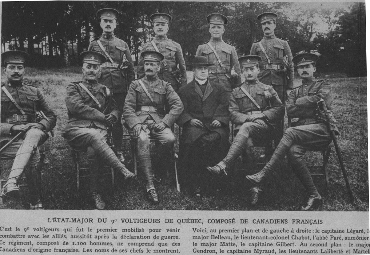 extrait du journal "le miroir".